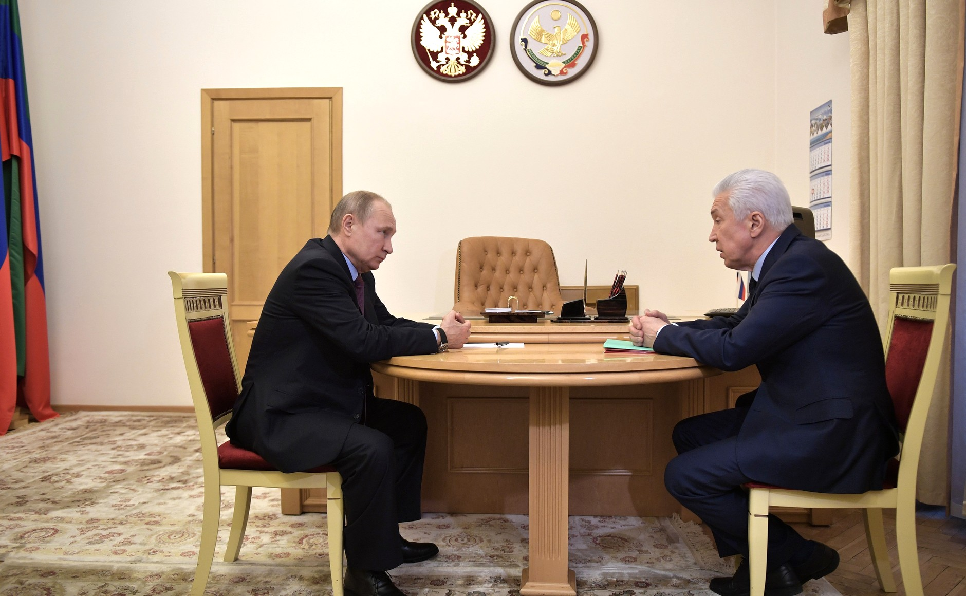 C временно исполняющим обязанности главы Дагестана Владимиром Васильевым в Махачкале